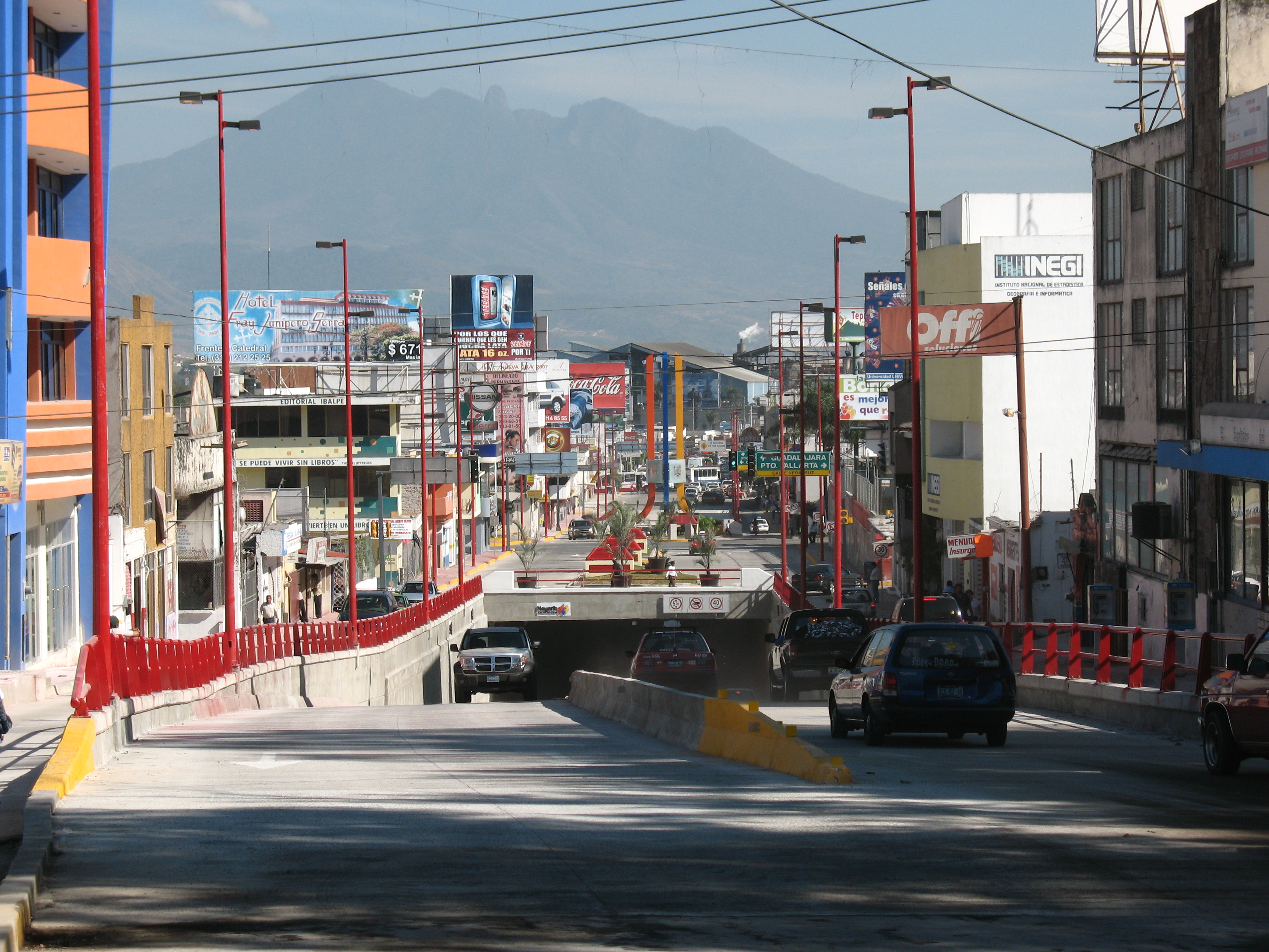 Primer nodo vial de cinco que se tienen planeados construir en la ciudad de Tepic.